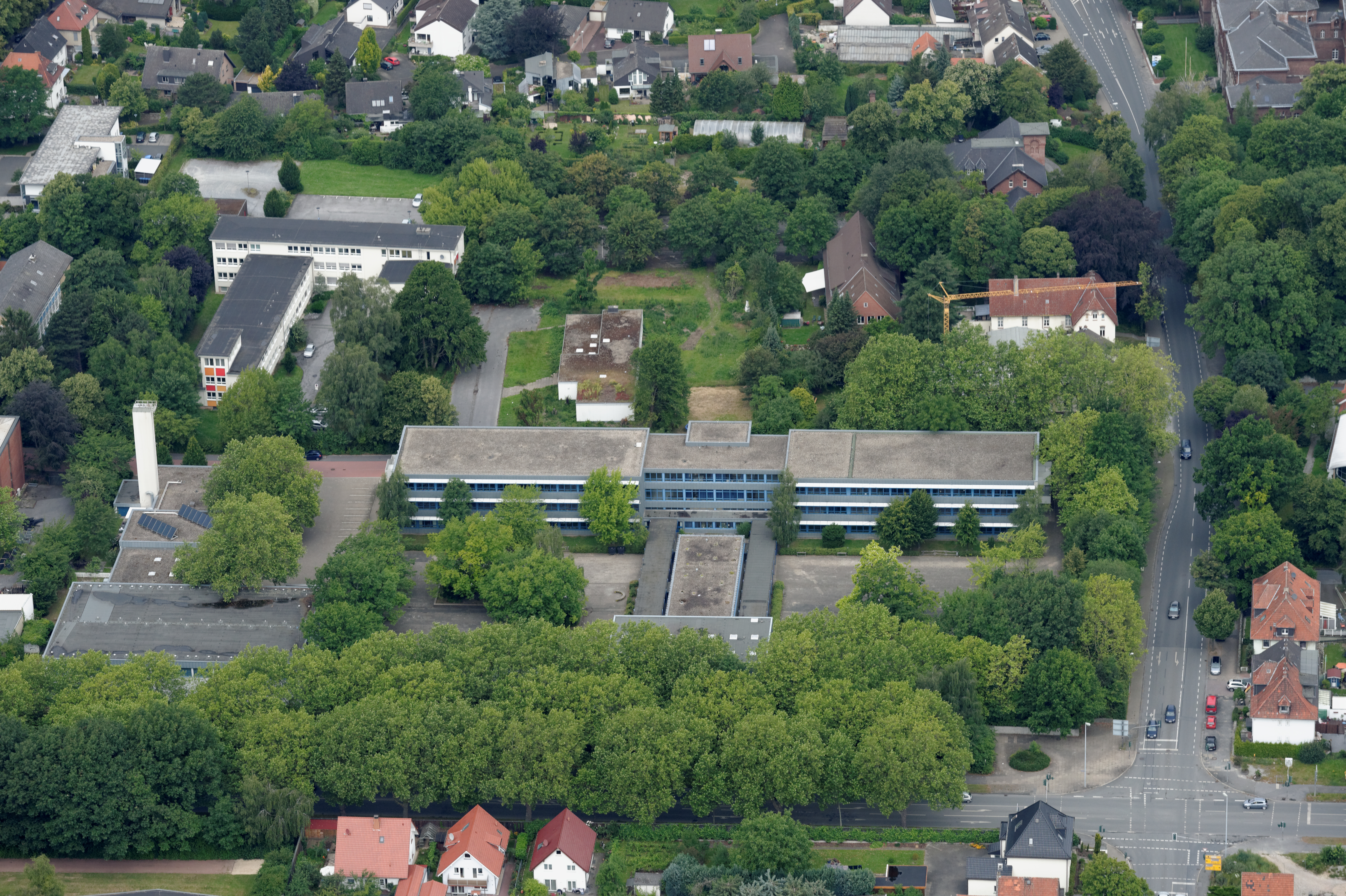 Fotoflug Sauerland Nord. Hansa-Realschule Soest The making of this document was supported by the Community-Budget of Wikimedia Germany.